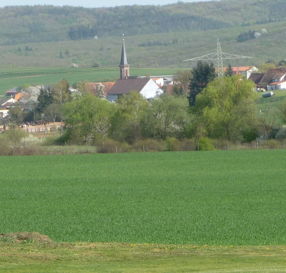 Börrstadt